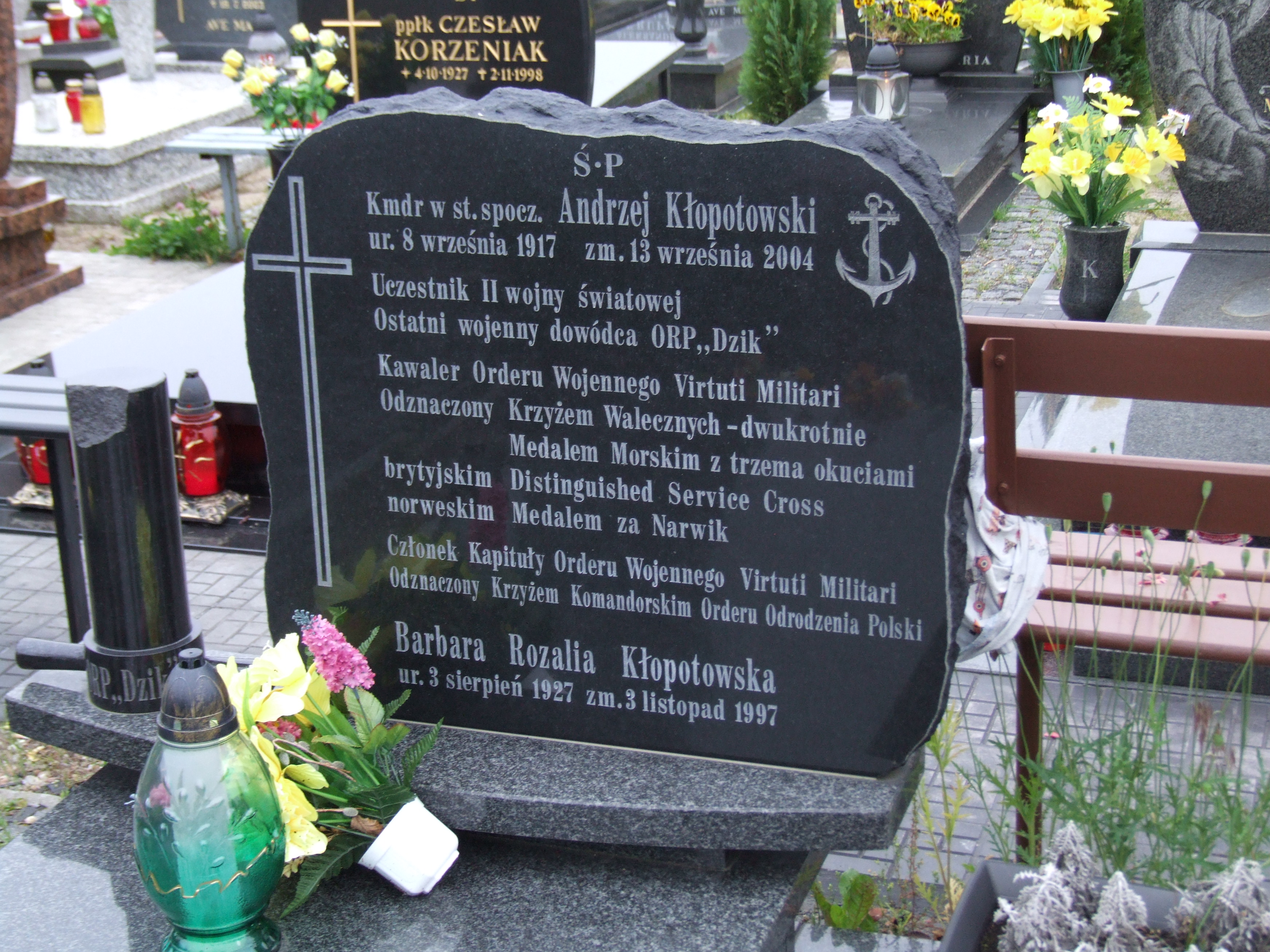 Gdynia-Oksywie Cmentarz Marynarki Wojennej